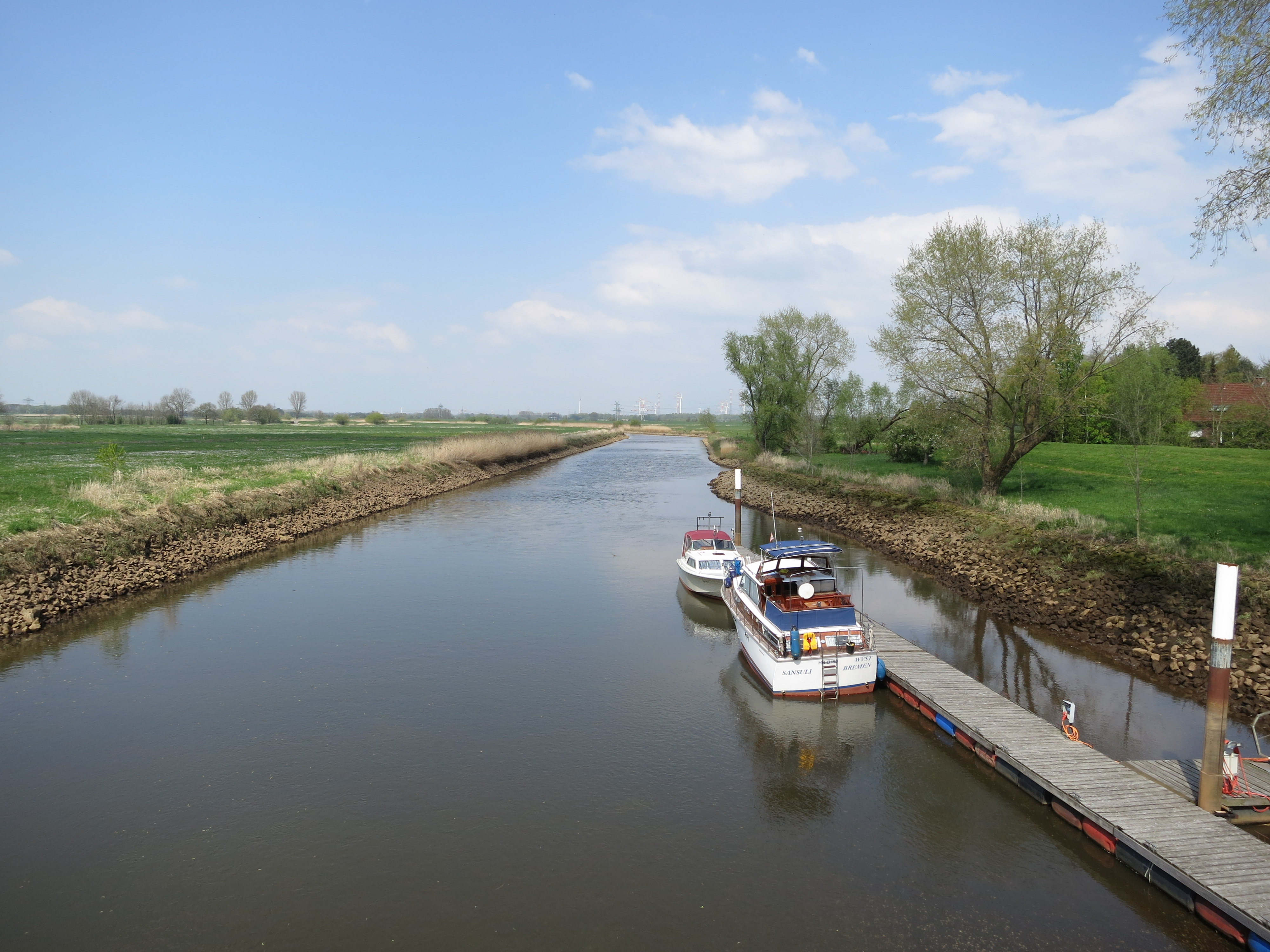 Ochtum von der Brücke zwischen Bremen-Strom (rechtes Ufer) und Delmenhorst-Bungerhof (linkes Ufer) aus in Fließrichtung gesehen